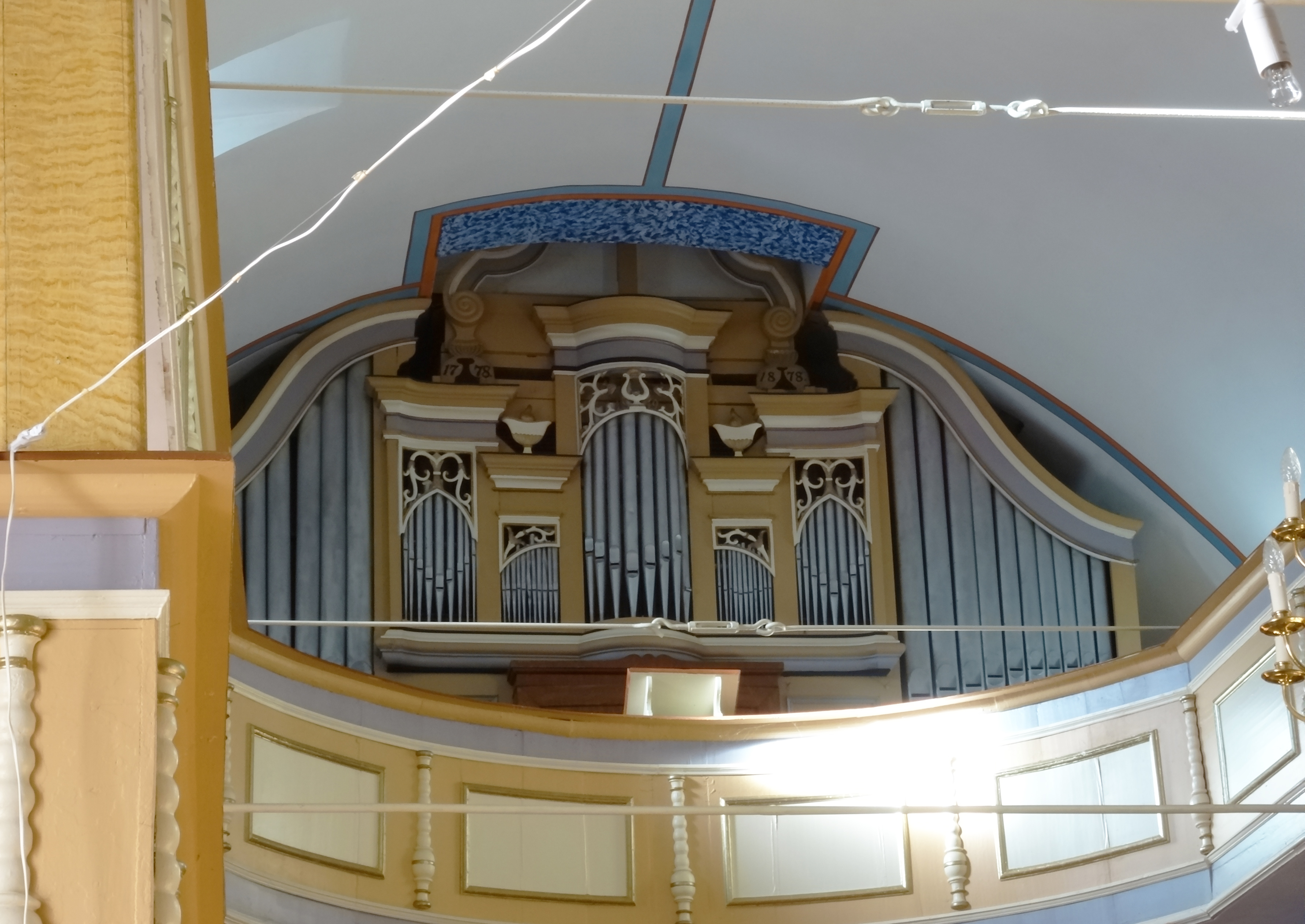 Orgelneubau 1778 durch Johann Stephan Schmaltz, von Gottlieb Knauf 1848 umgebaut.